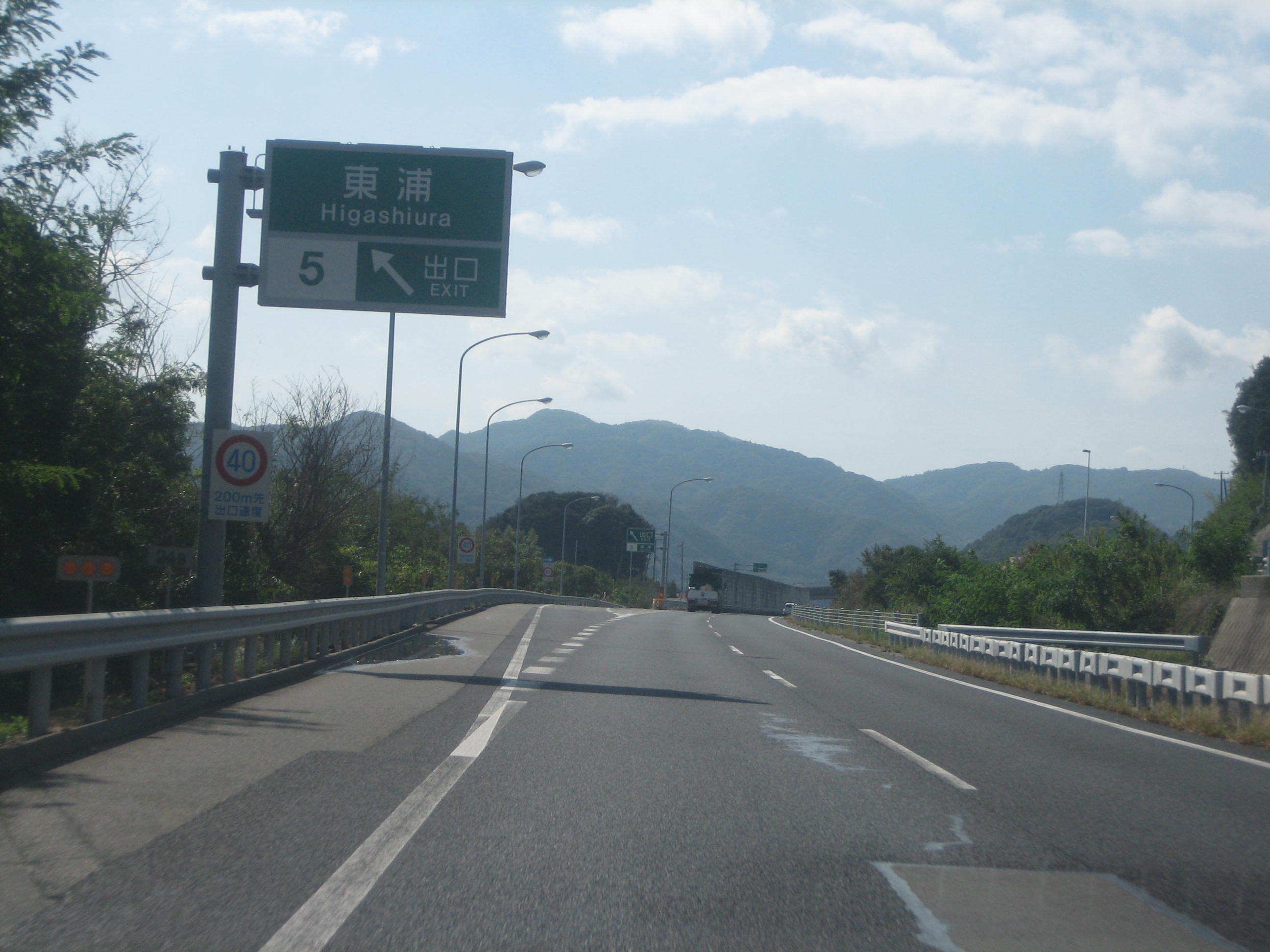 東浦IC